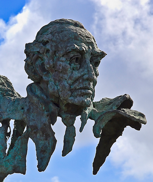 Fotografía del rostro de Jesús Delgado Valhondo en el monumento de los tres poetas de Badajoz, escultura obra de Luis Martínez Giraldo